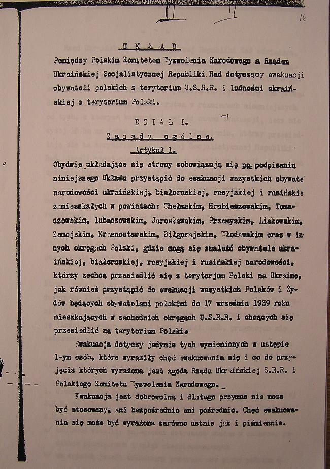 Pierwsza strona Układu polsko-ukraińskiego z 9 września 1944 r. o ewakuacji ludności (tzw. układ republikański) (zdjęcie kserokopii oryginału)